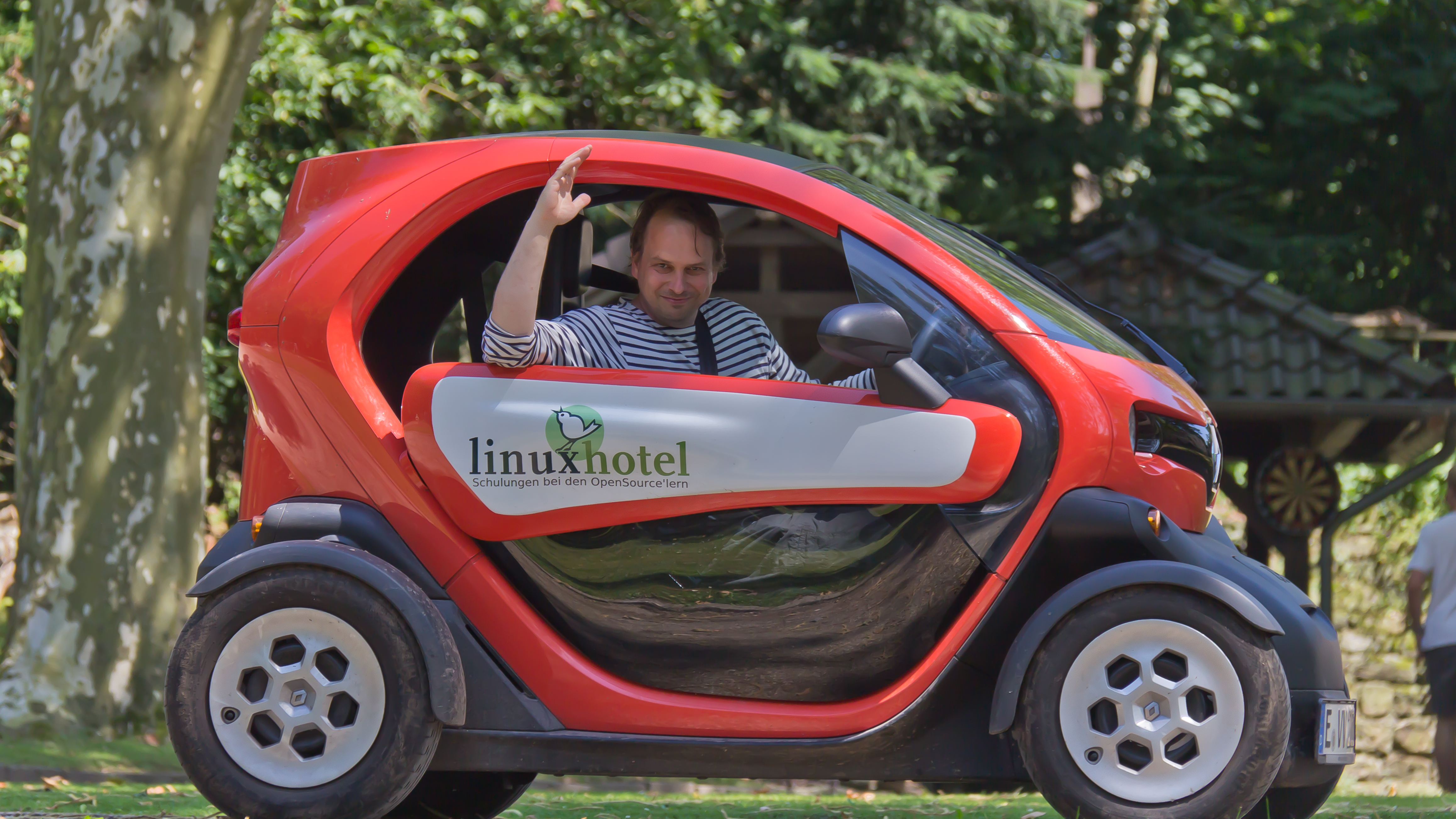 Wikipedia-Urheberrechtsworkshop Juli 2014. Das Linuxhotel stellt seinen Gästen auch einen Renault Twizy zur Verfügung.